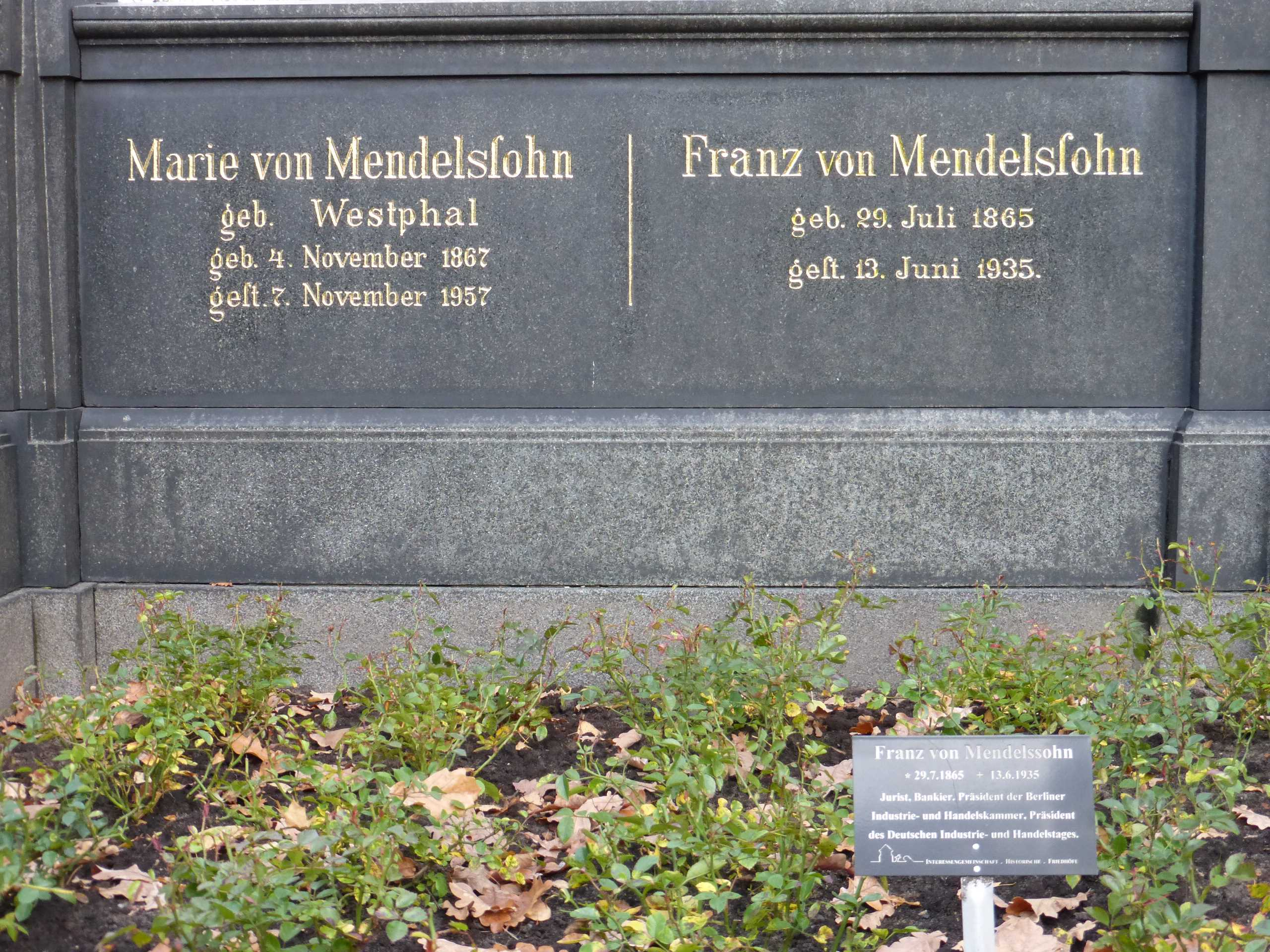 Deitsch: Grabstätte von Franz von Mendelssohn dem Jüngeren auf den Friedhöfen am Halleschen Tor